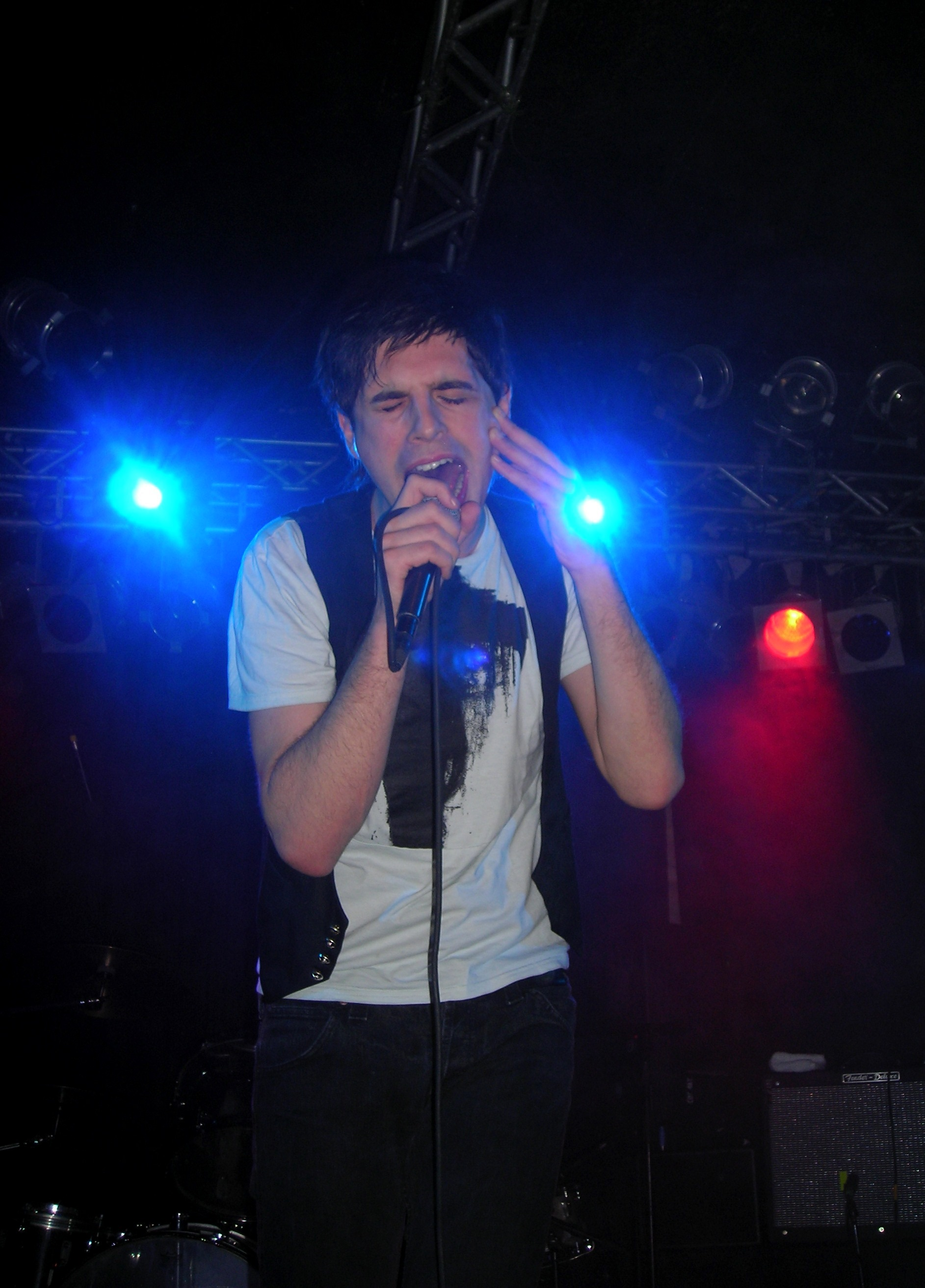 Dan Black live @ Circolo Degli Artisti, Roma